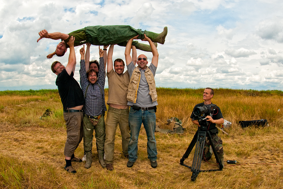 A Láthatatlan Madárfotós Sorozat Stábja, jobbra Máté Bence (Csaj-tó, Csongrád megye, Magyarország)